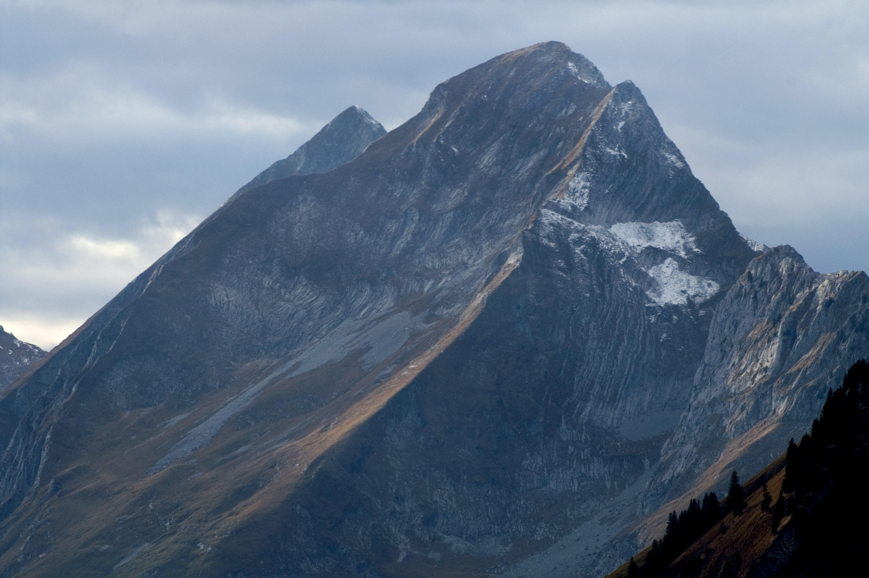 Le sommet de la Dent de Brenleire dans les Alpes, 2353 mètres. Author: Fanny Schertzer